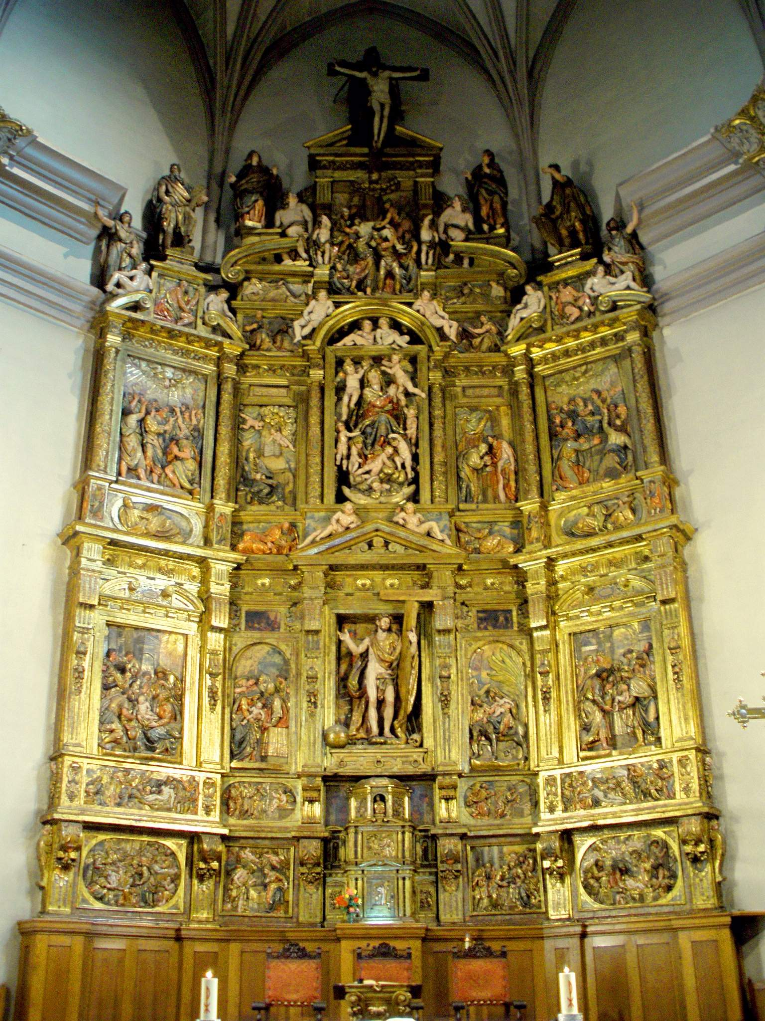 Retablo mayor de la Iglesia de Santa María de Tafalla (Navarra). Obra cumbre del escultor José de Ancheta, en estilo manierista romanista, de finales del S-XVI